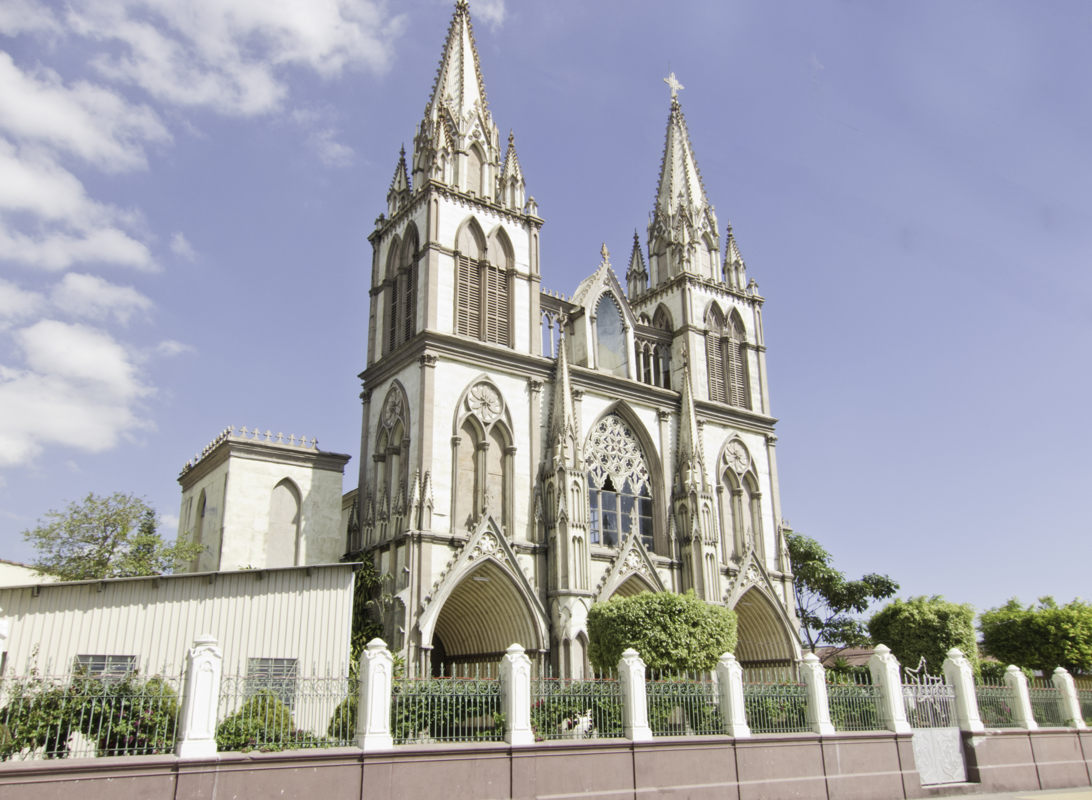 Catedral de Santa Tecla, Enero 2011